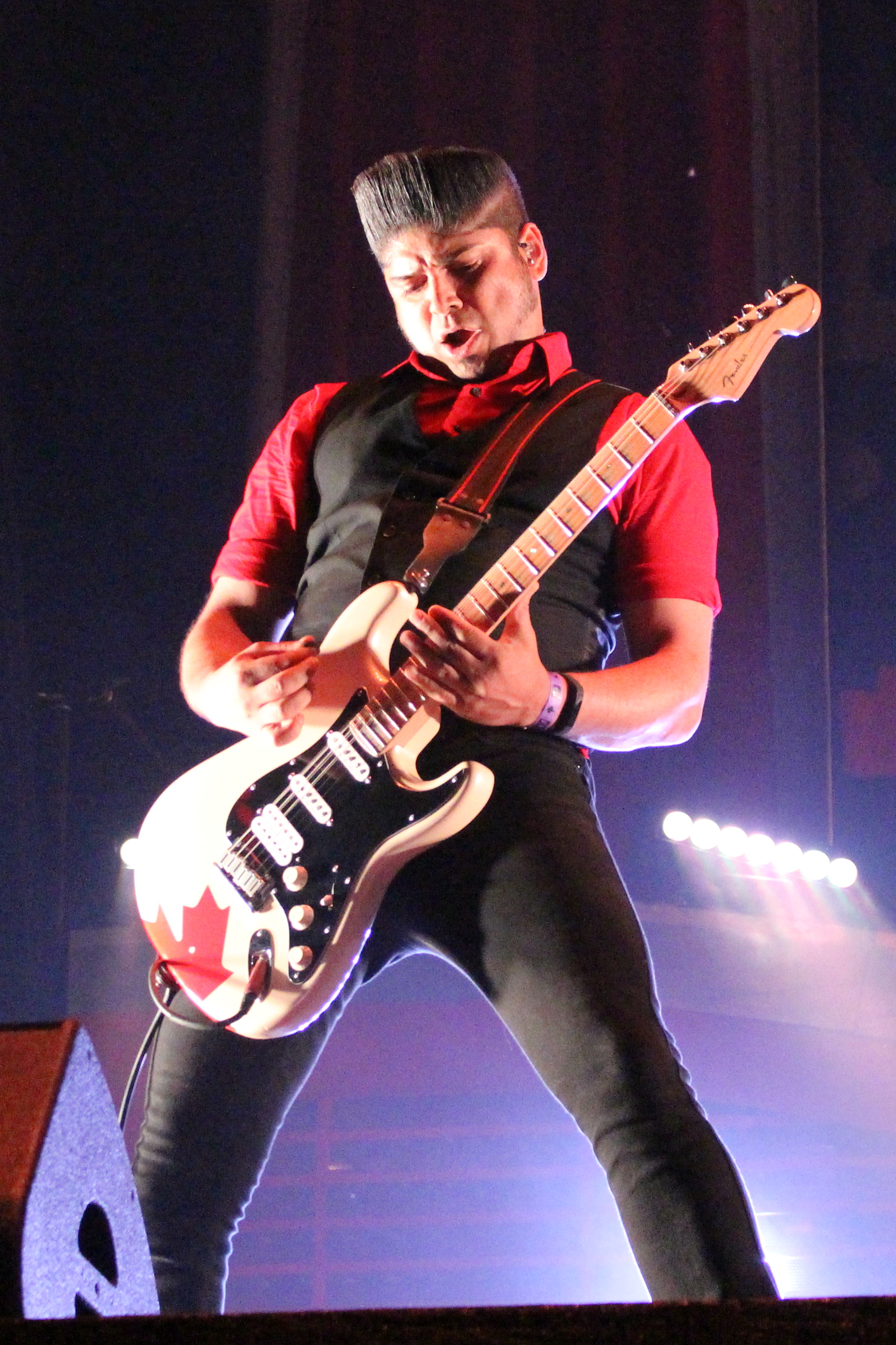 Festivalsommer This photo was created with the support of donations to Wikimedia Deutschland in the context of the CPB project "Festival Summer".